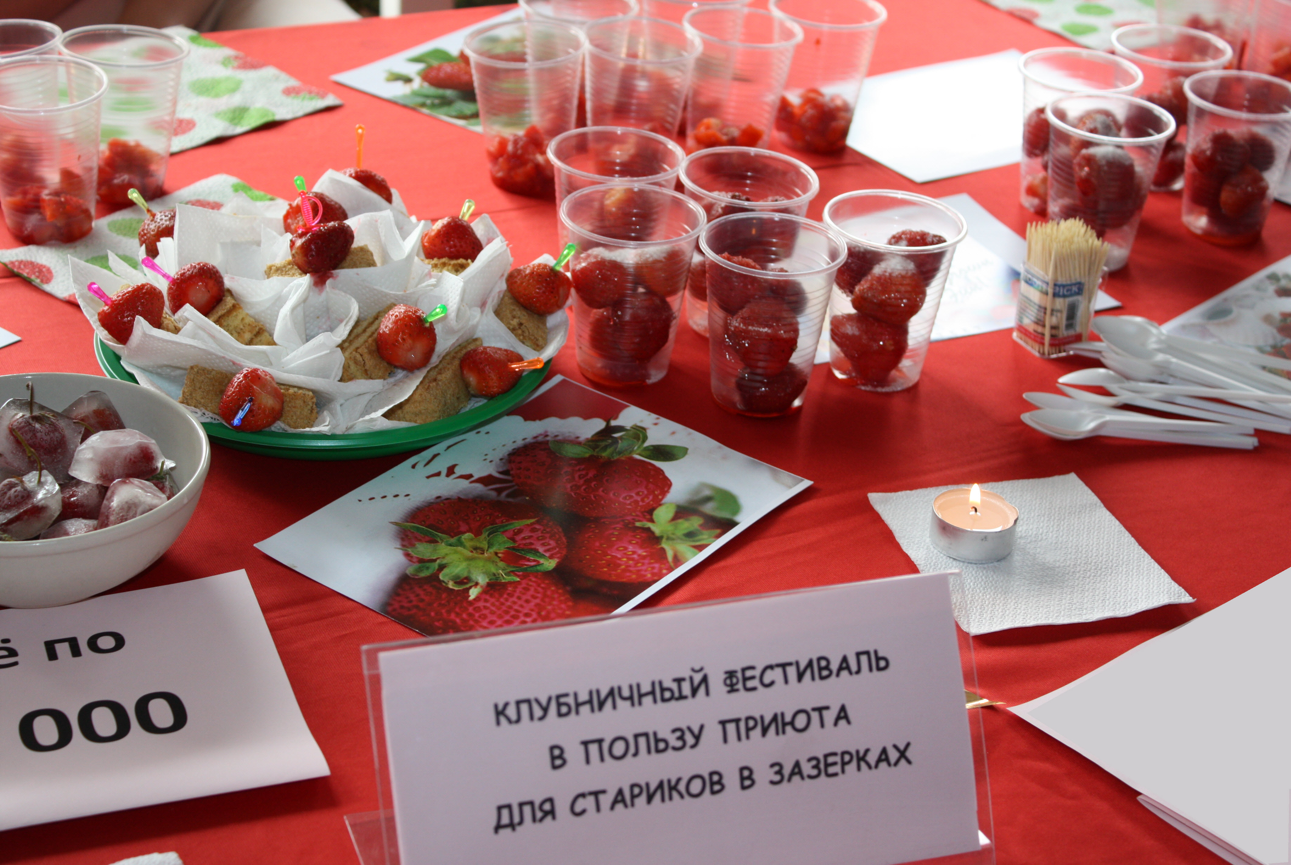 Благотворительный Клубничный фестиваль, июнь 2012